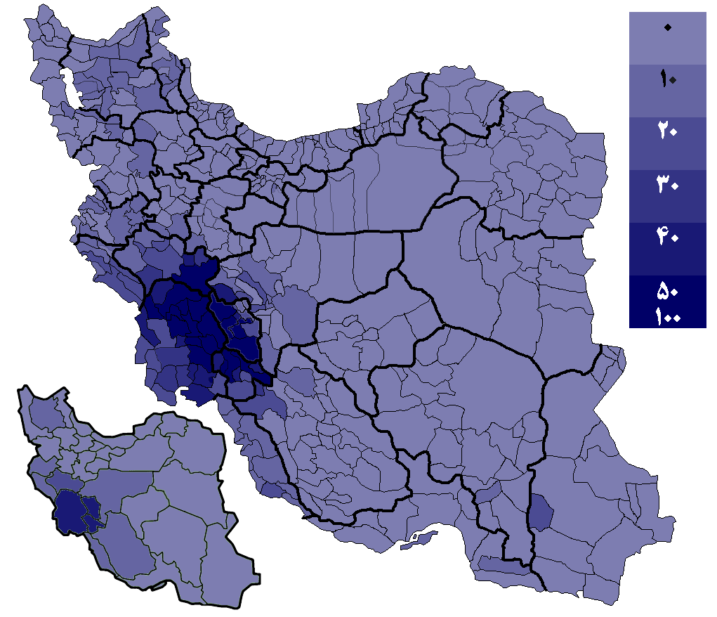 درصد رای محسن رضایی انتخابات ریاست‌جمهوری ایران (۱۳۹۲) به تفکیک شهرستان Provinces of Iran